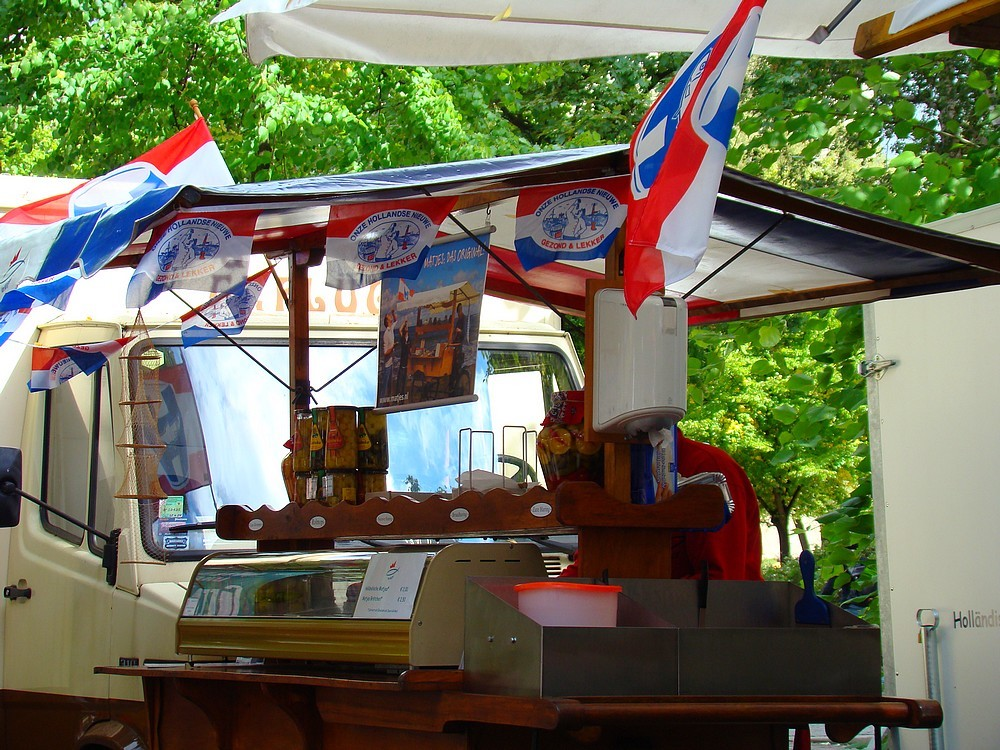 Wochenmarkt Berlin Charlottenburg Karl-August-Platz Fotoserie